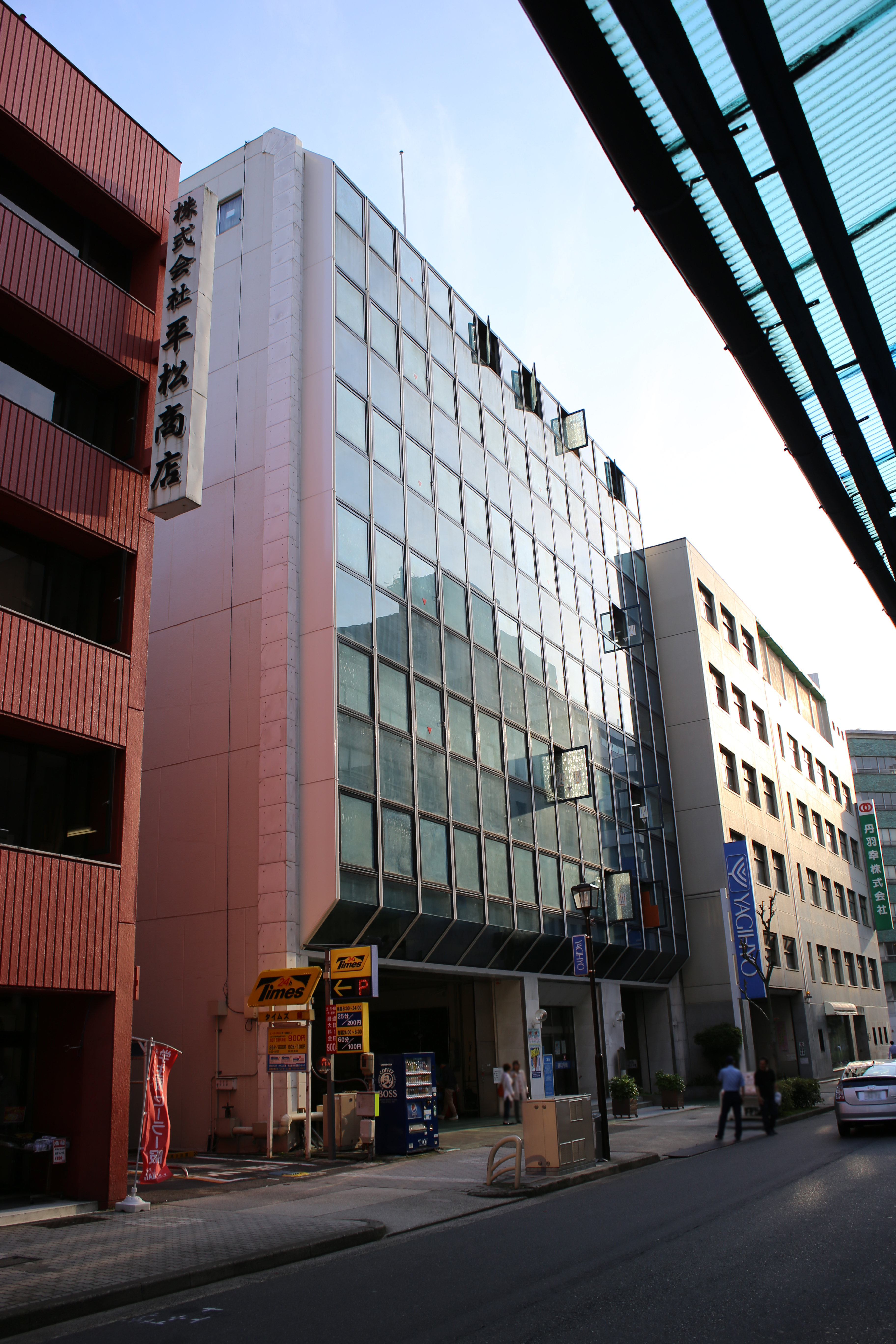 名古屋市中区錦二丁目の八木兵錦第10号館を北側公道東側より撮影。ただし、人物・ナンバープレートにつき画像処理済み。